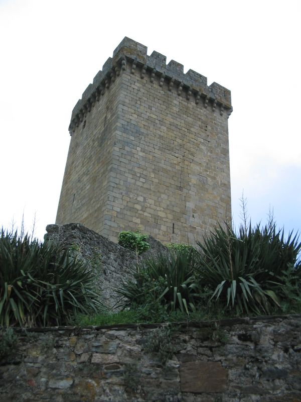 Torre de Monforte, Lugo, Galiza